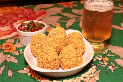 Pestico participante do Evento Comida di Buteco em 2014. Bar Fish Maria, com o tira-gosto Capitão do Fish, um bolinho de feijão com recheio de tucunaré desfiado.